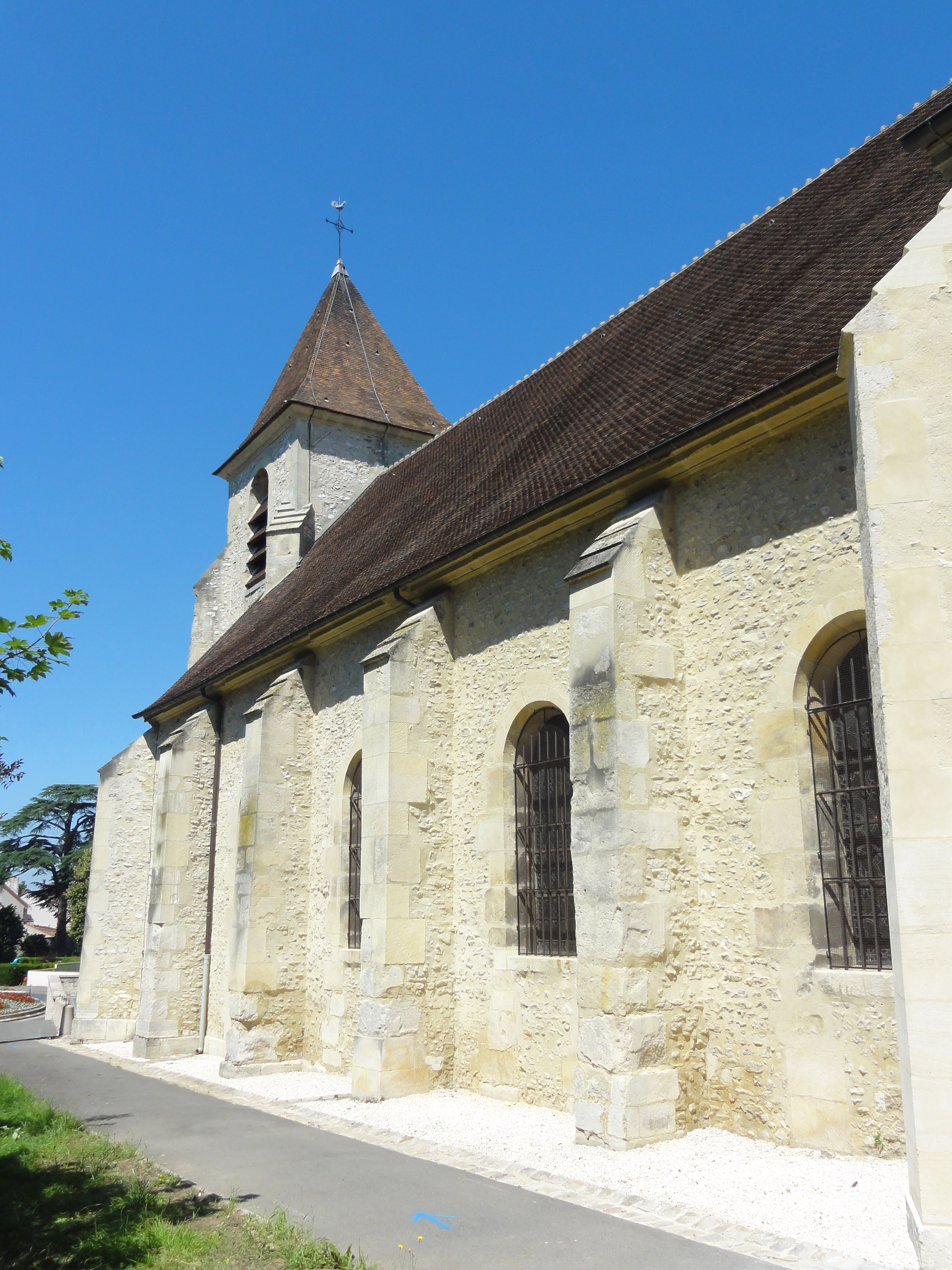 Nef, vue depuis le sud-est.